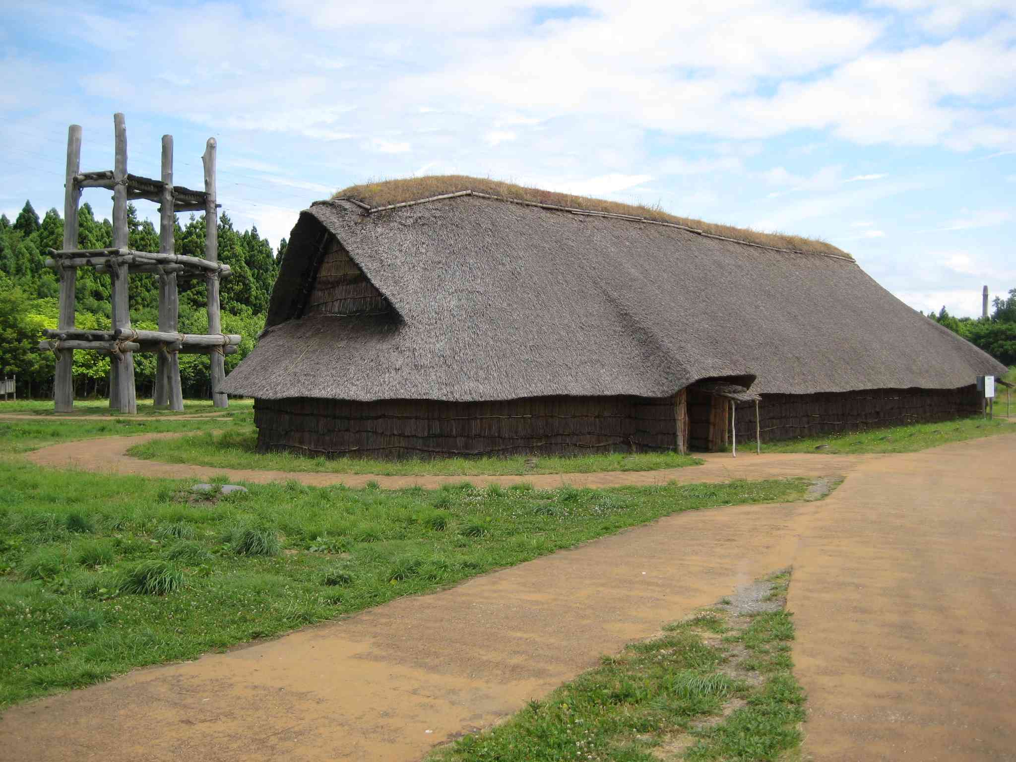 Maison commune au site de Sannai Maruyama